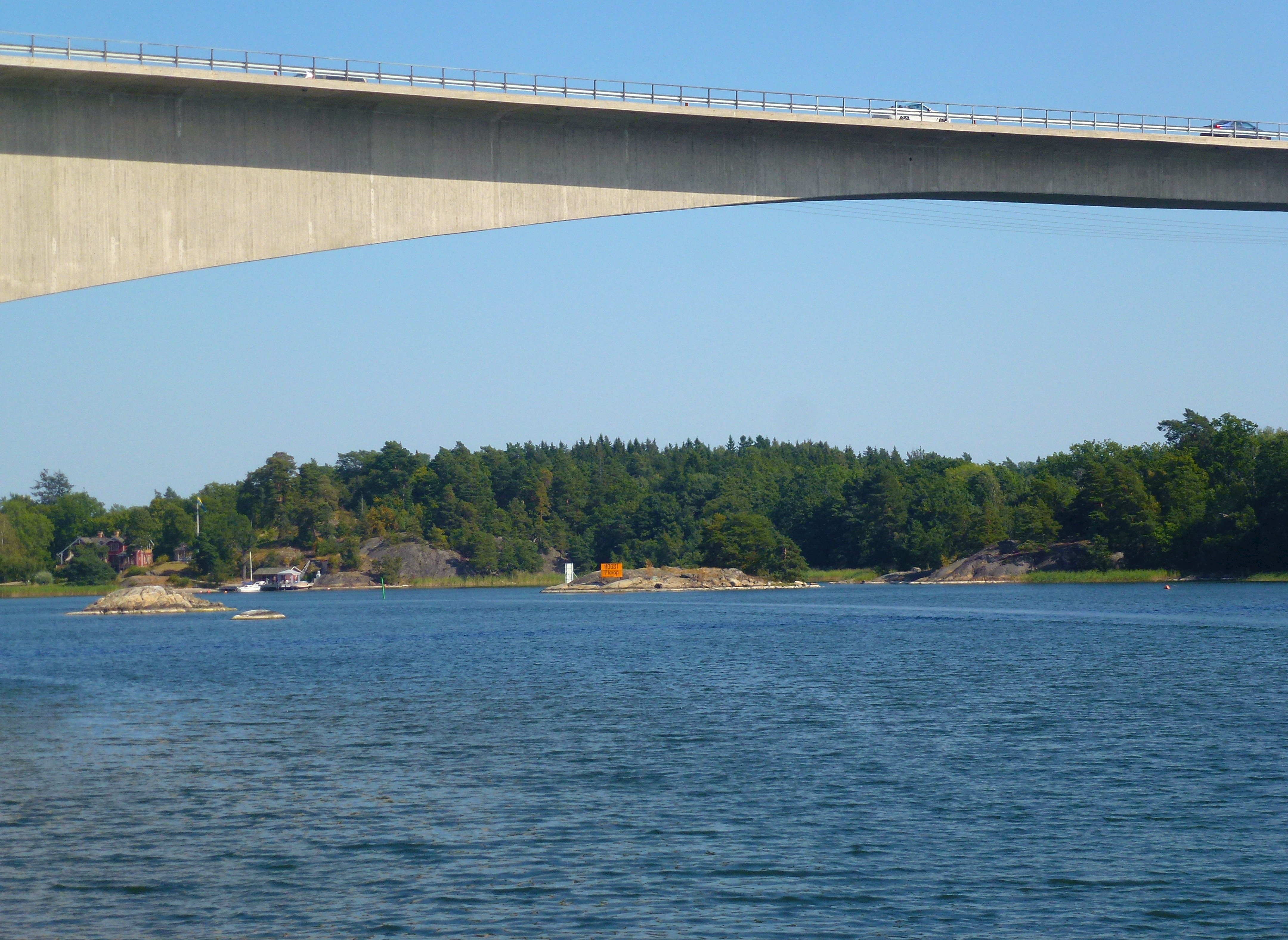 Farstabron och Farstaviken från västra brofäste